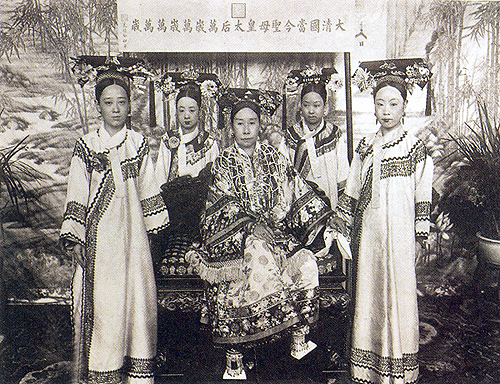 左起：德龄、四格格（庆亲王奕劻第四女）、慈禧太后、元大奶奶（慈禧内姪媳）、容龄